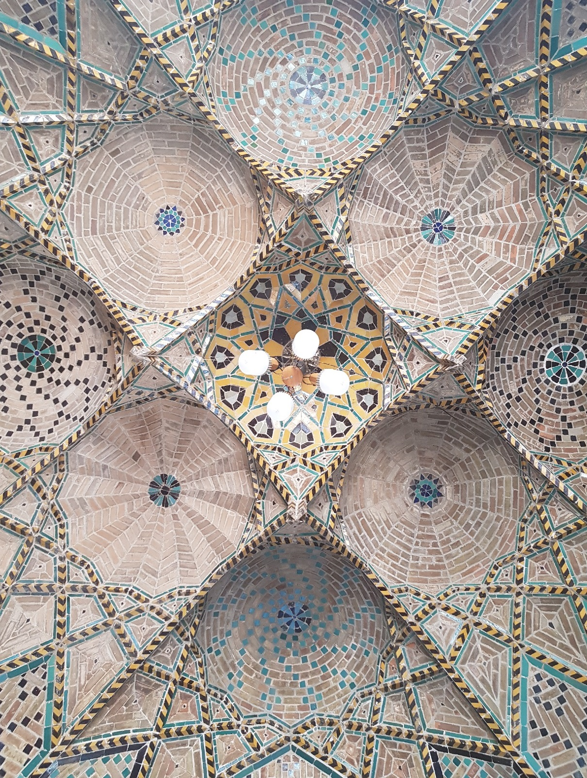 طاق راهروی ورودی مسجد جامع از خیابان سپه